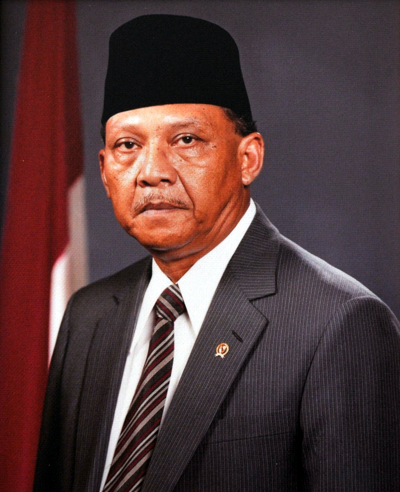 Foto Resmi Umar Wirahadikusuma